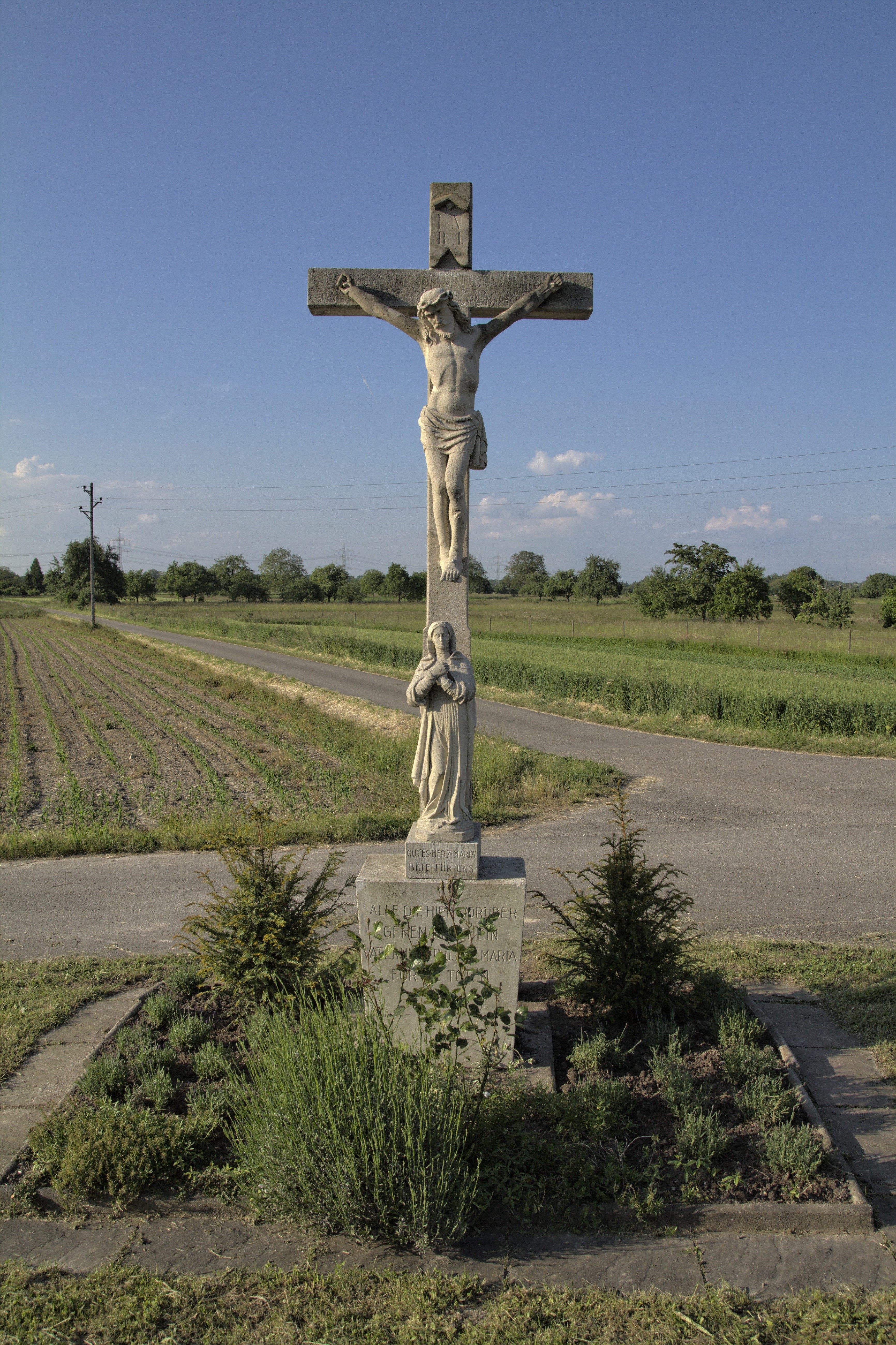 Ein Wegekreuz in Steinmauern Richtung Rheinaue auf der Kreisstraße K3726